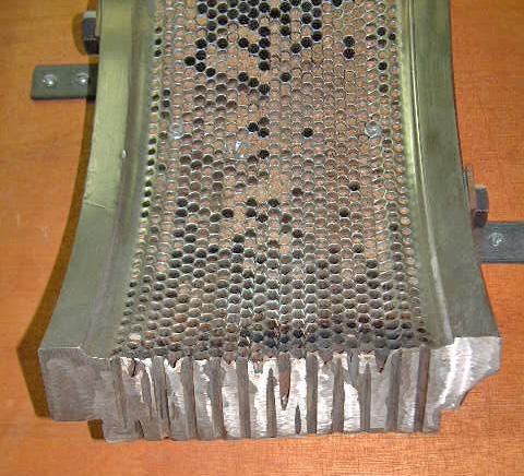 Beschreibung: Querschnitt durch eine Ringmatrizenpresse Fotograf: Benutzer:BMK 2004 Please send reference and voucher copy to BMK(at)clever.ms Bitte Quellenangabe und Beleg an BMK(at)clever.ms